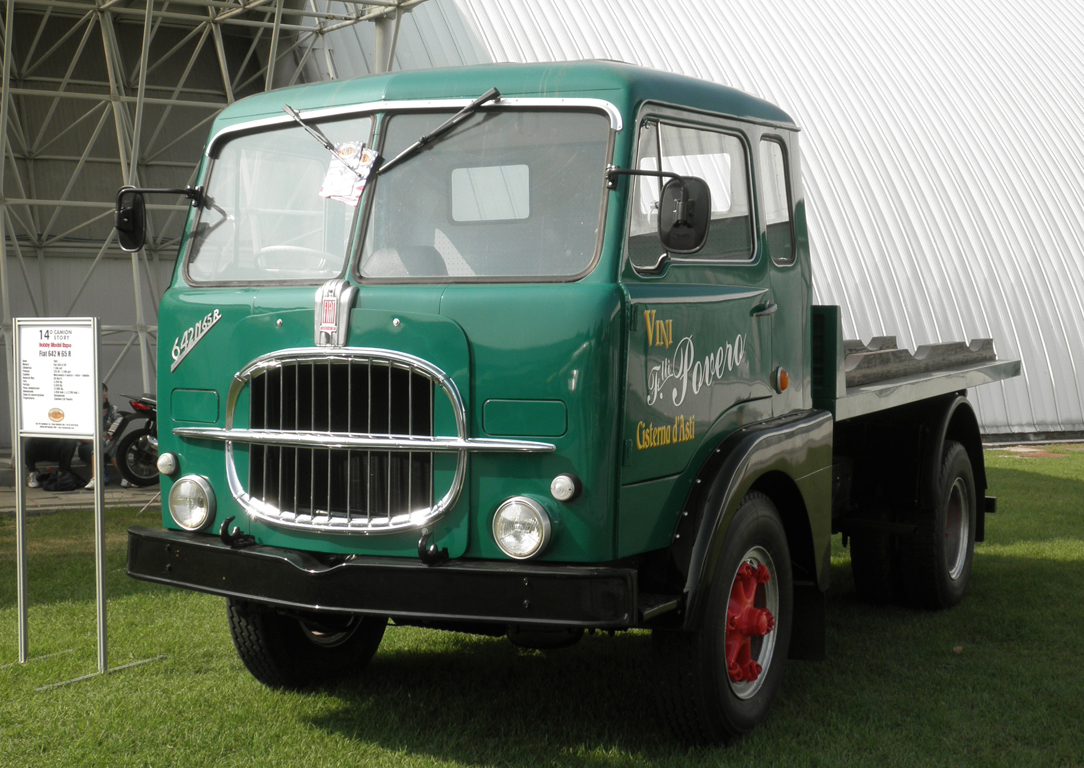 Autocarro FIAT 642 N 65 R esposto alla fiera Hobby Model Expo di Novegro del 2011